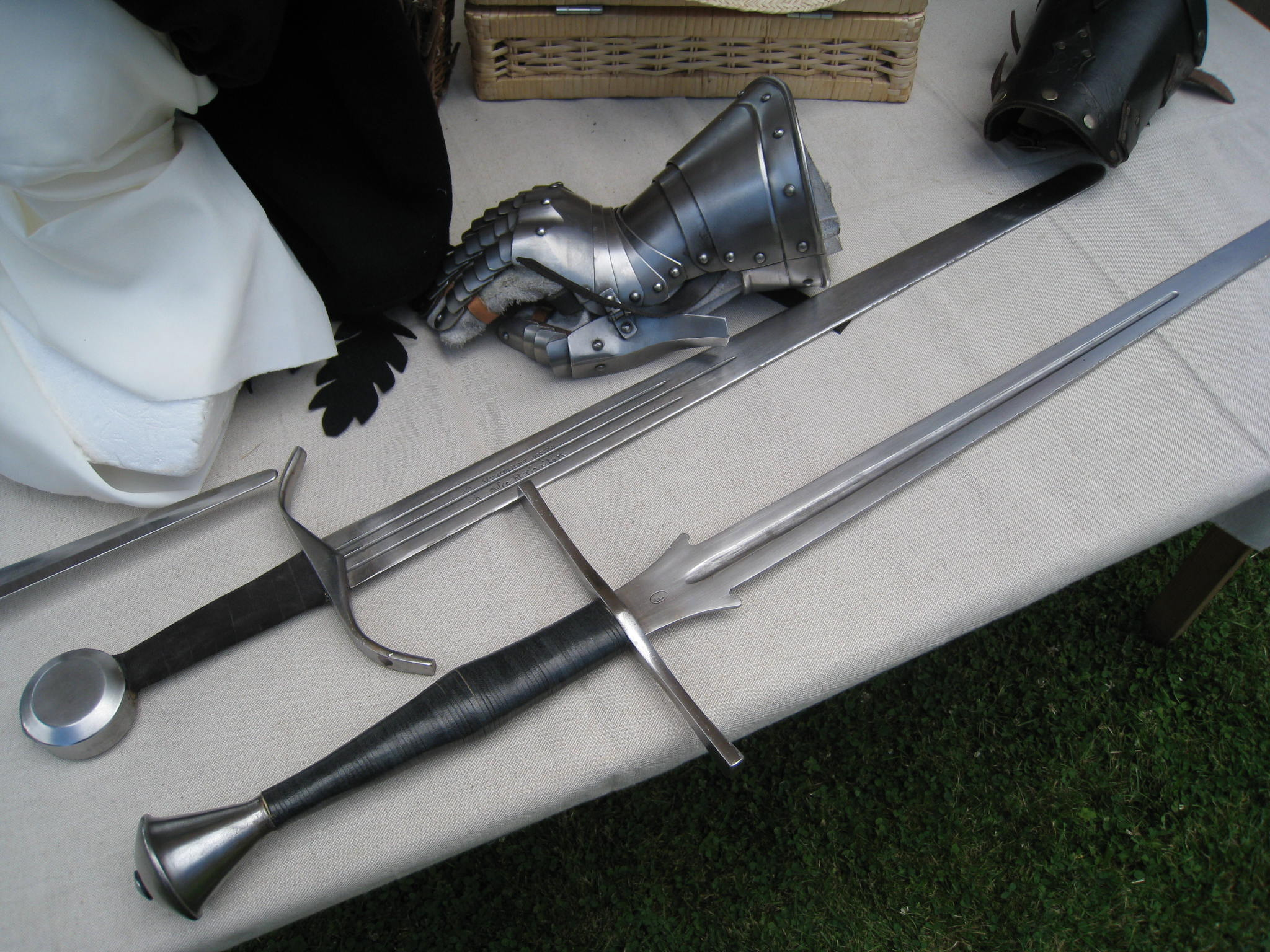 Verschillende soorten zwaarden. Middeleeuwen.